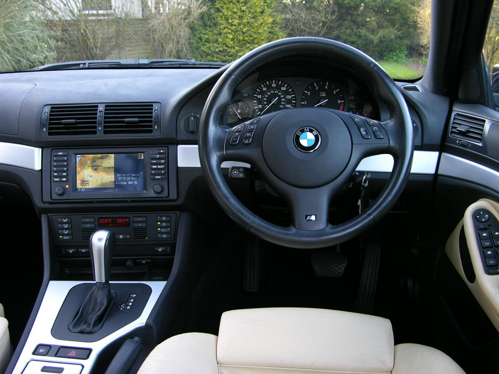 BMW 530i Sport Individual